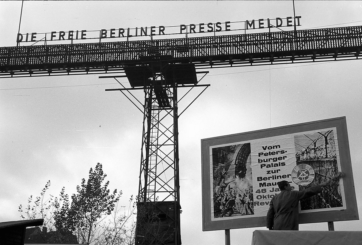 Die Leuchtschriftanlage an der Berliner Mauer am Potsdamer Platz.